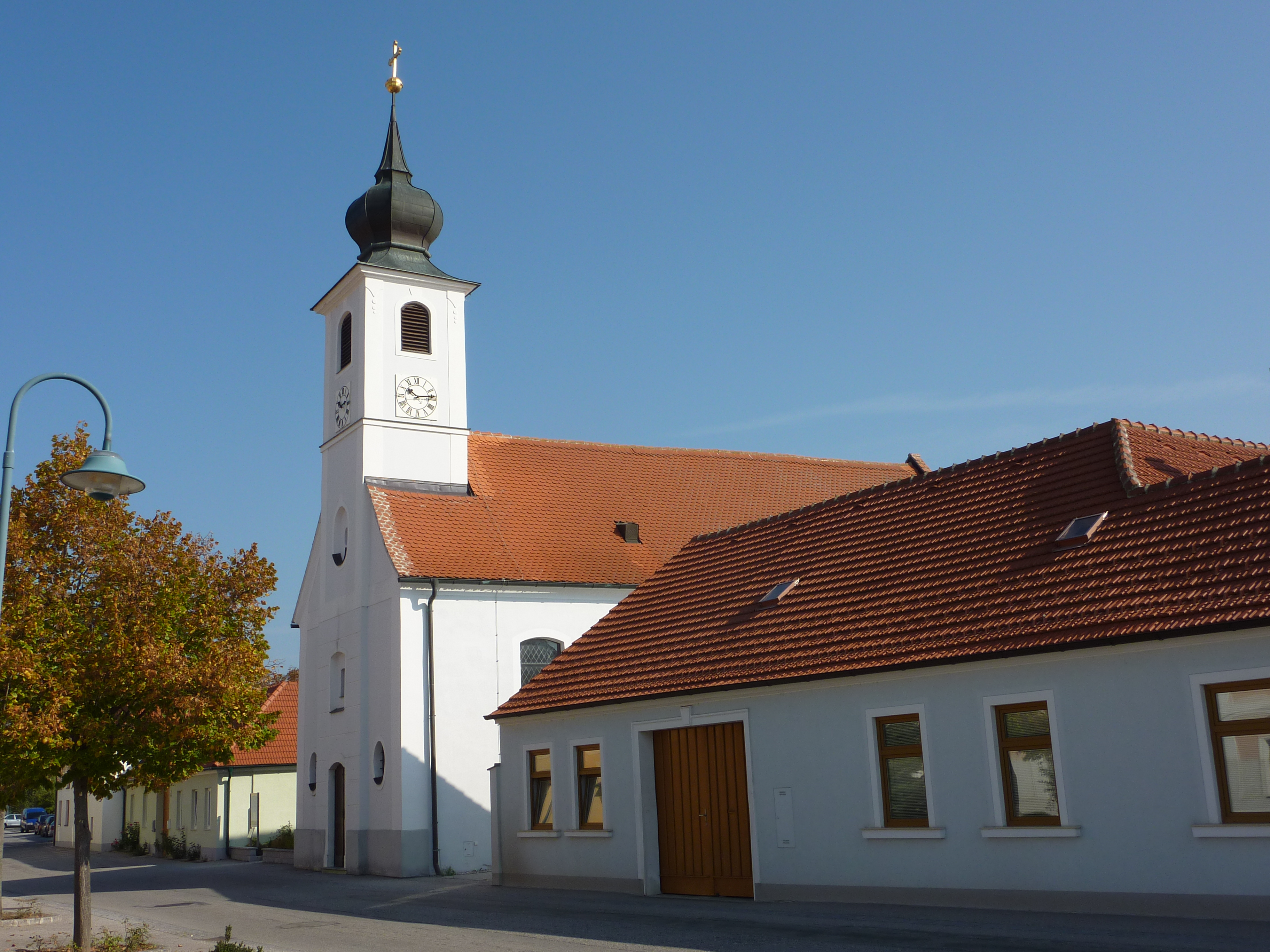 Pfarrkirche, Brunn im Felde, Gedersdorf, Niederösterreich